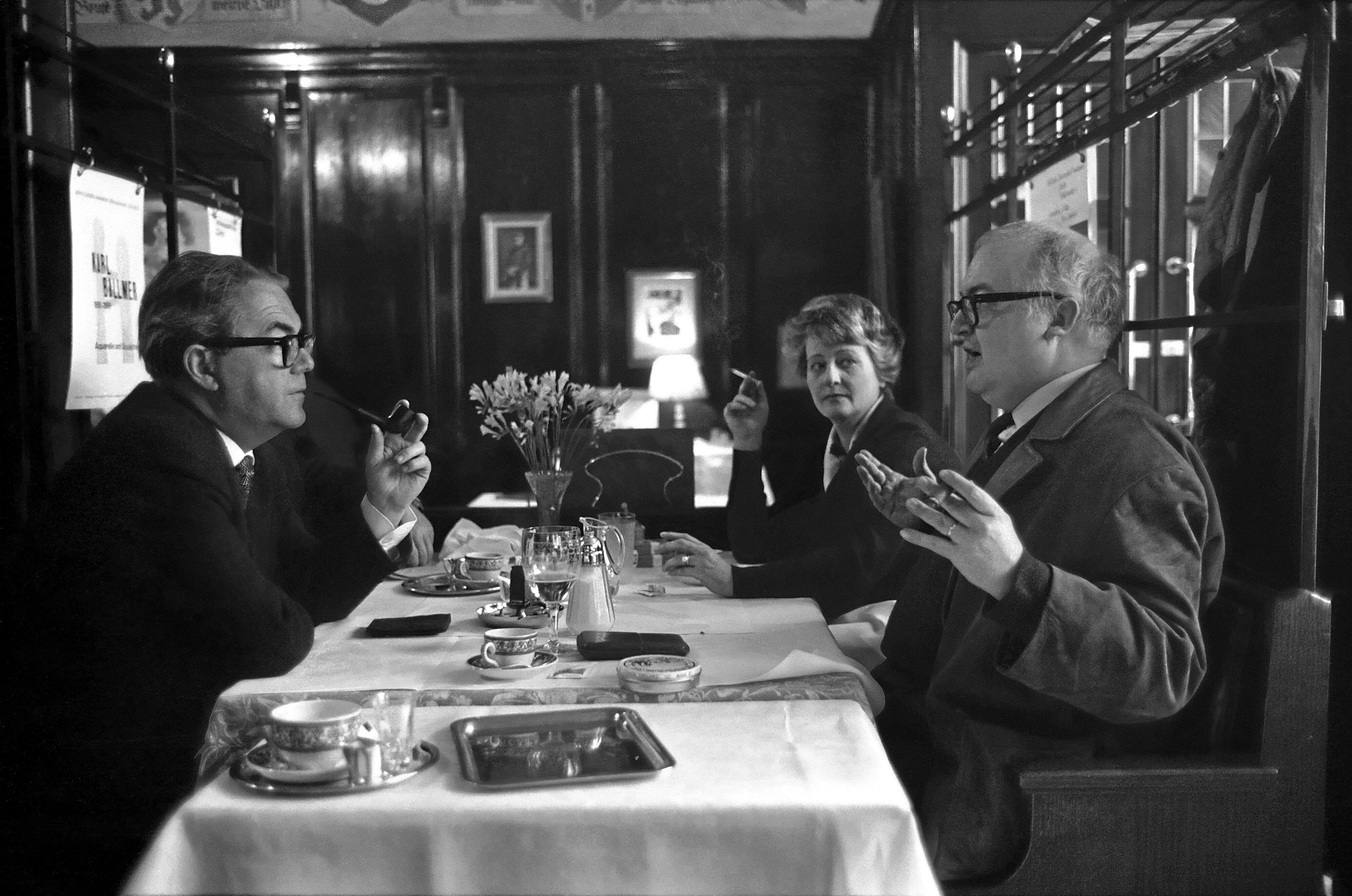 Im Hintergrund sitzt möglicherweise die erste Ehefrau von Max Frisch, Gertrud Frisch-von Meyenburg (in der Originalbeschreibung steht der Name von Frischs Mutter, Karolina Bettina Frisch)